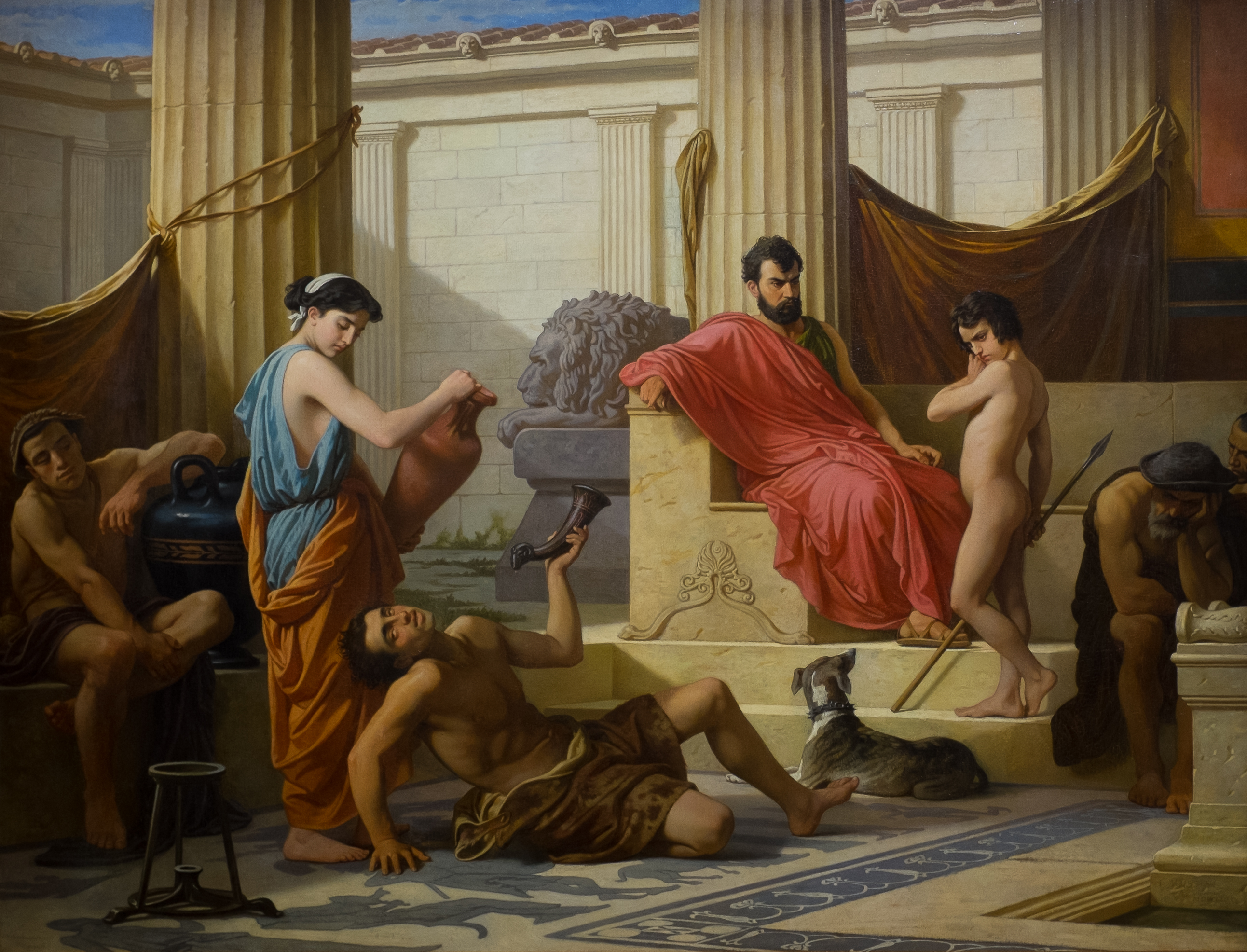 L'éducation à Sparte pendant l'exposition Fenêtres sur cours.